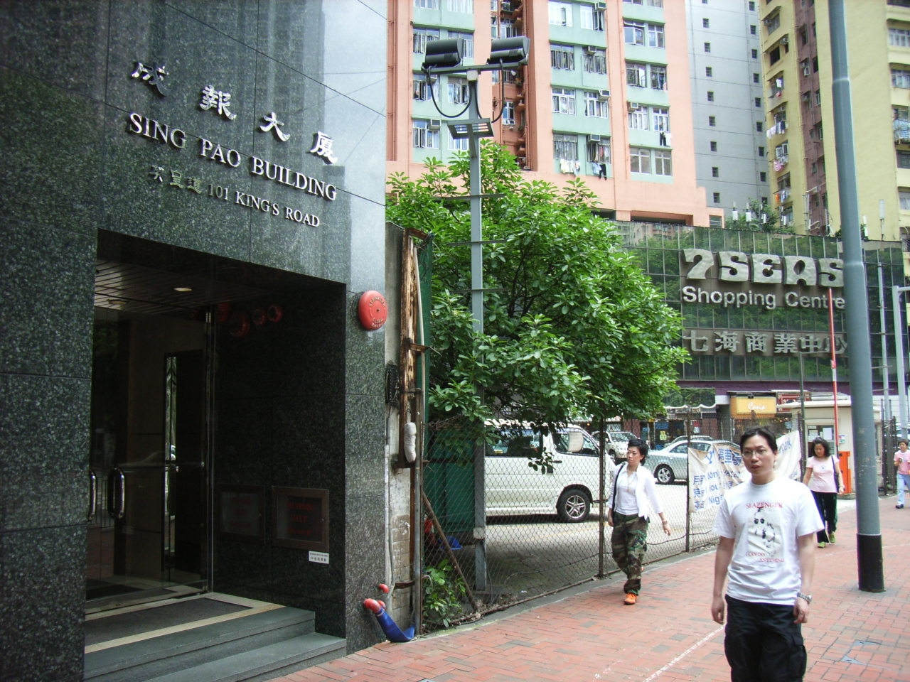 Sing Pao Building, North Point, Hong Kong User:Tin Ho SP Lim